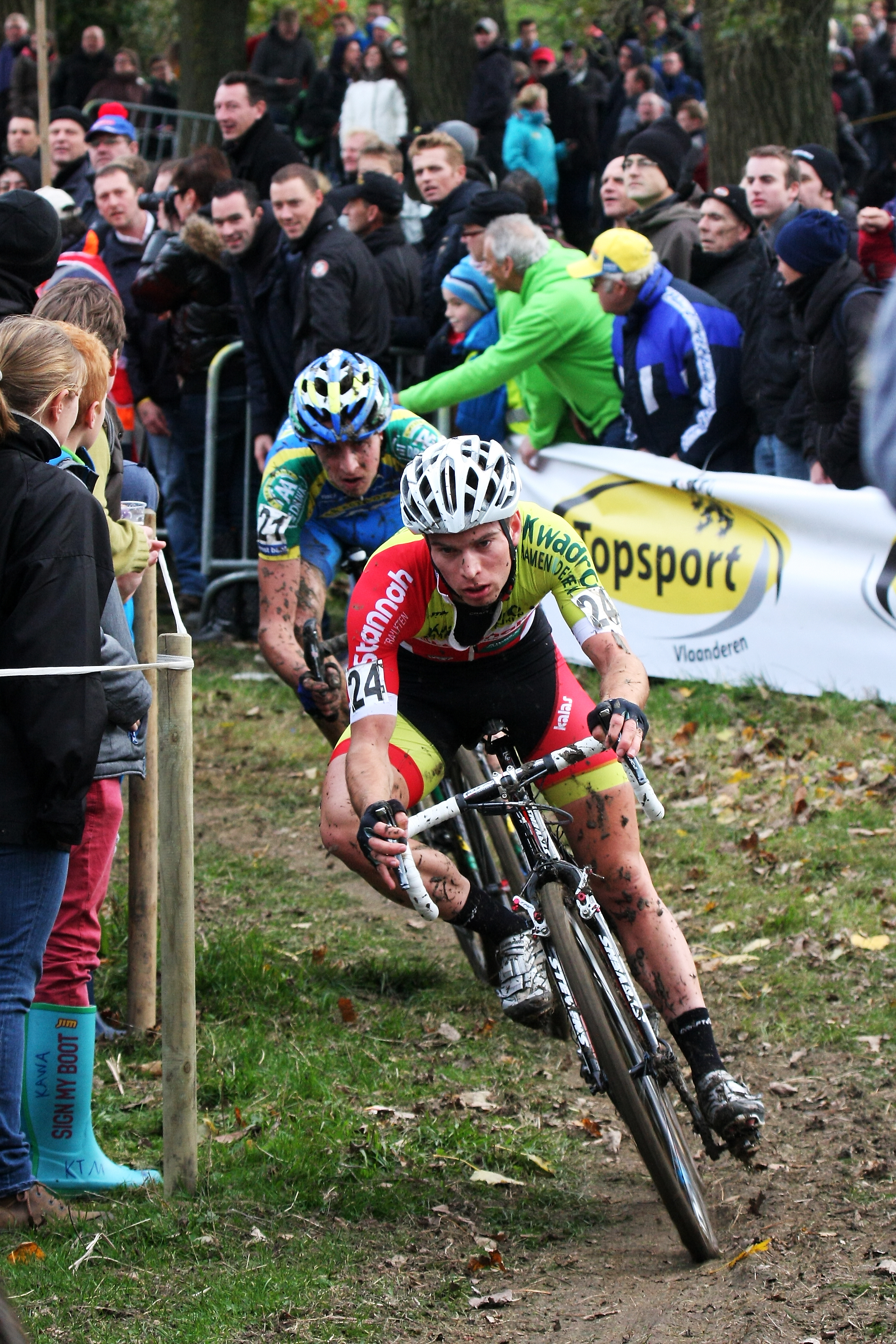 Marcel Meisen tijdens Koppenbergcross 2013